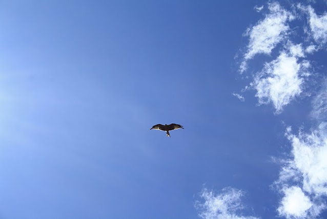 Rapace sur le plateau du Coyan